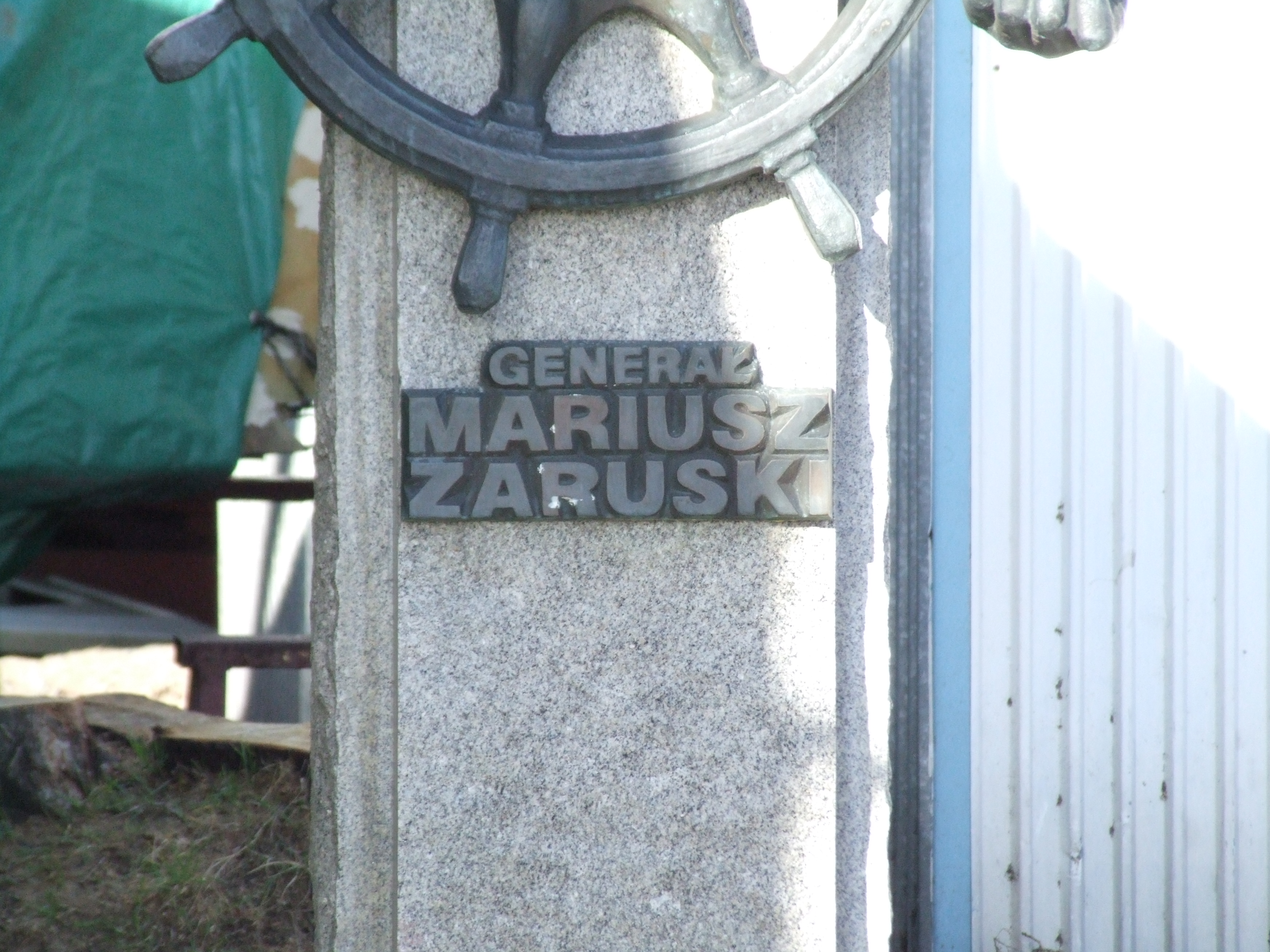 Pomnik generała Mariusza Zaruskiego - Gdynia